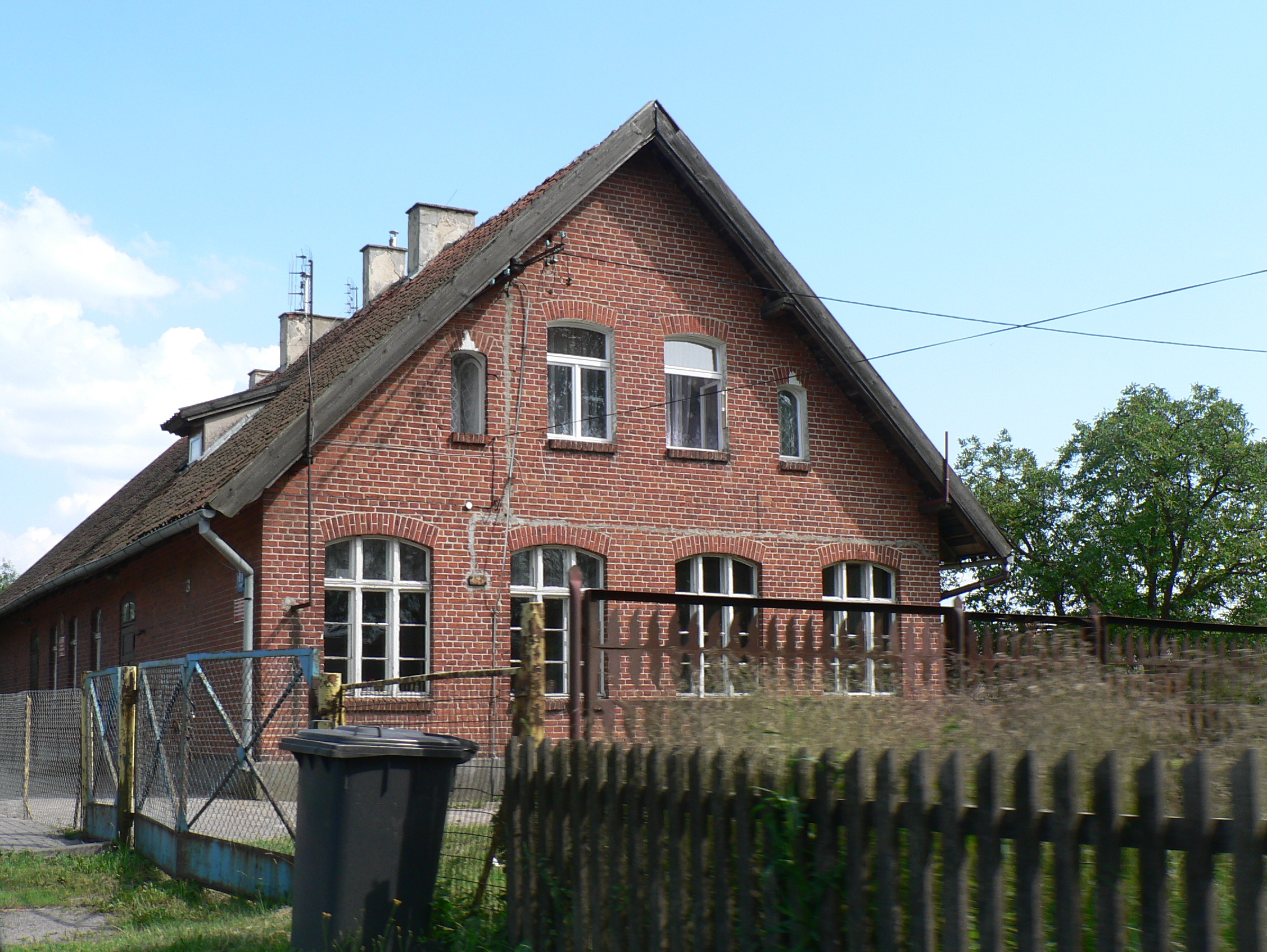 Szkoła podstawowa w Mierkach